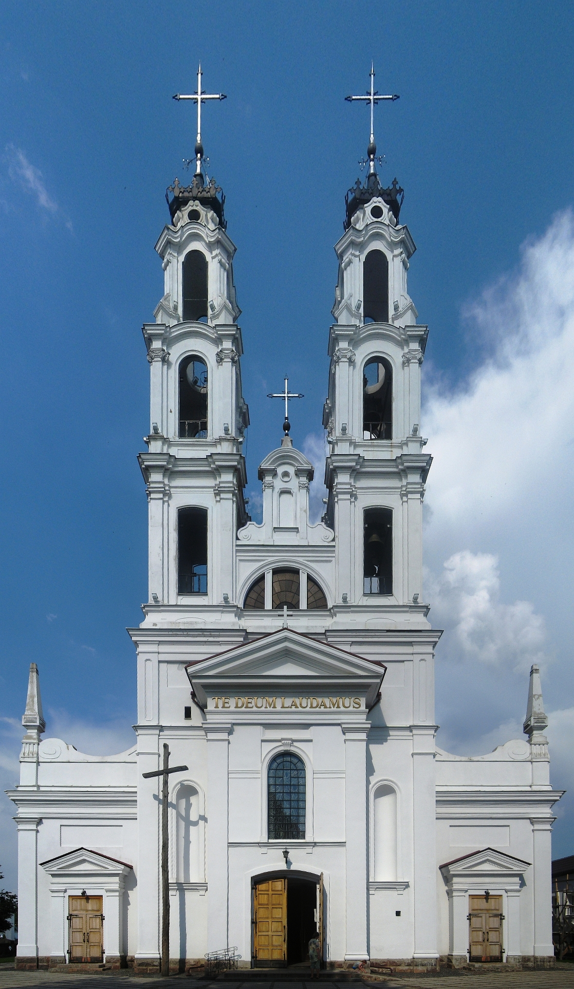 Фасад католического необарочного костела в городе Ошмяны.